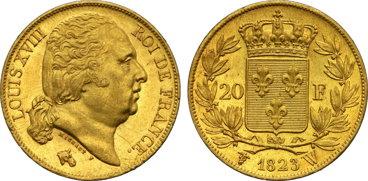 20 francs or à l'effigie de Louis XVIII